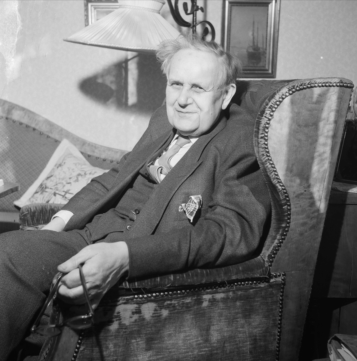 Henrik Børseth var en norsk skuespiller.